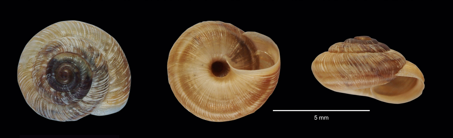 Xerocrassa penchinati